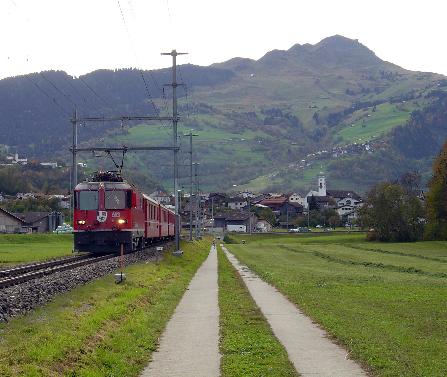 Castrisch im Kanton Graubünden mit einer Komposition der Rhätischen Bahn